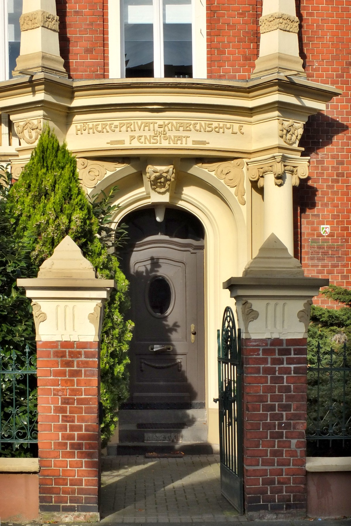 Höhere Privat-Knabenschule und Pensionat, Eingang, Hilden, Kolpingstraße 9-11This is a photograph of an architectural monument.